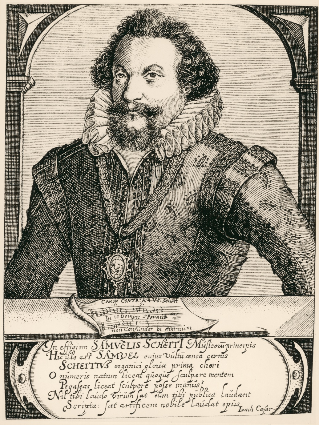 Depicted person: Samuel Scheidt